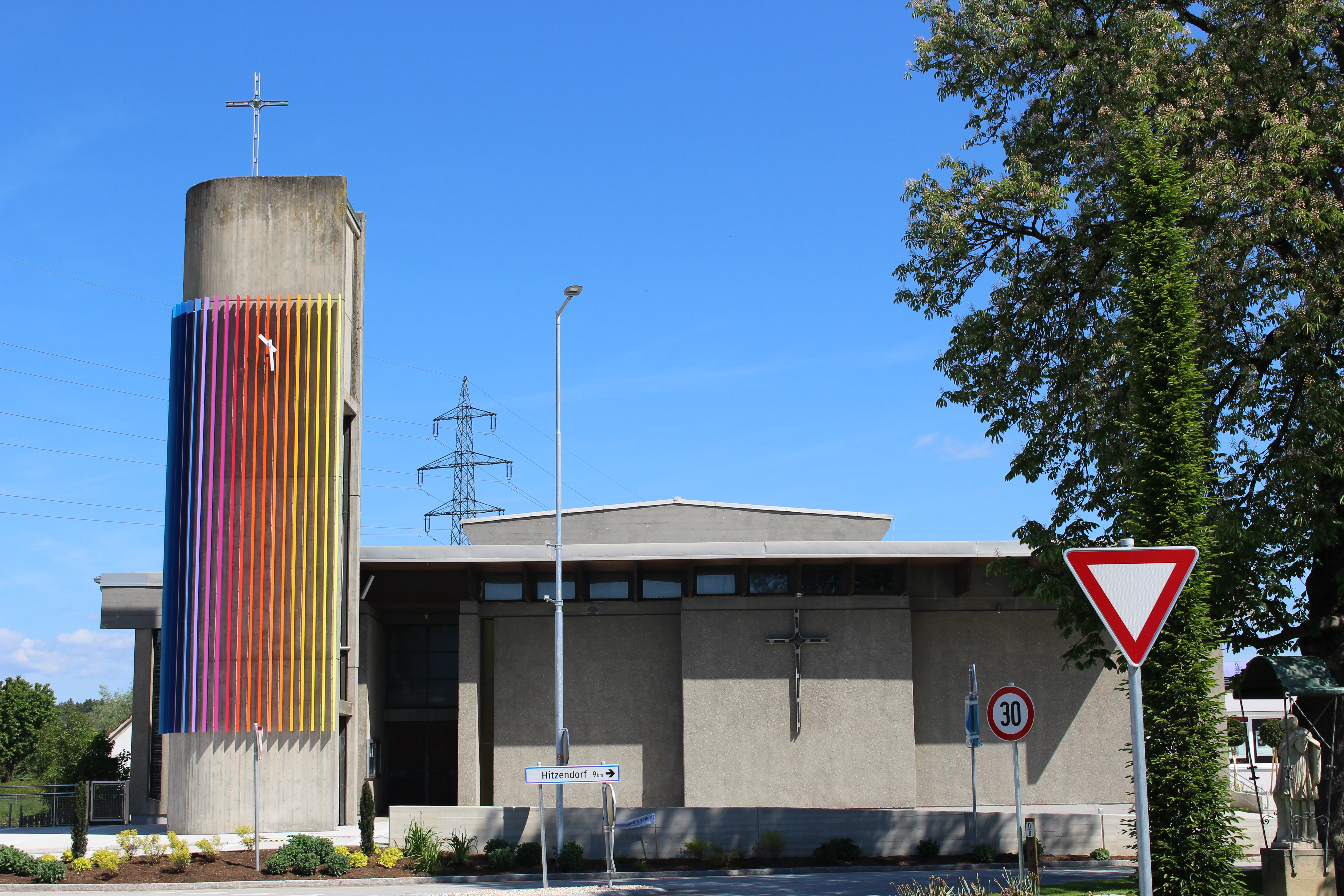 Pfarrkirche von Lieboch im Mai 2016